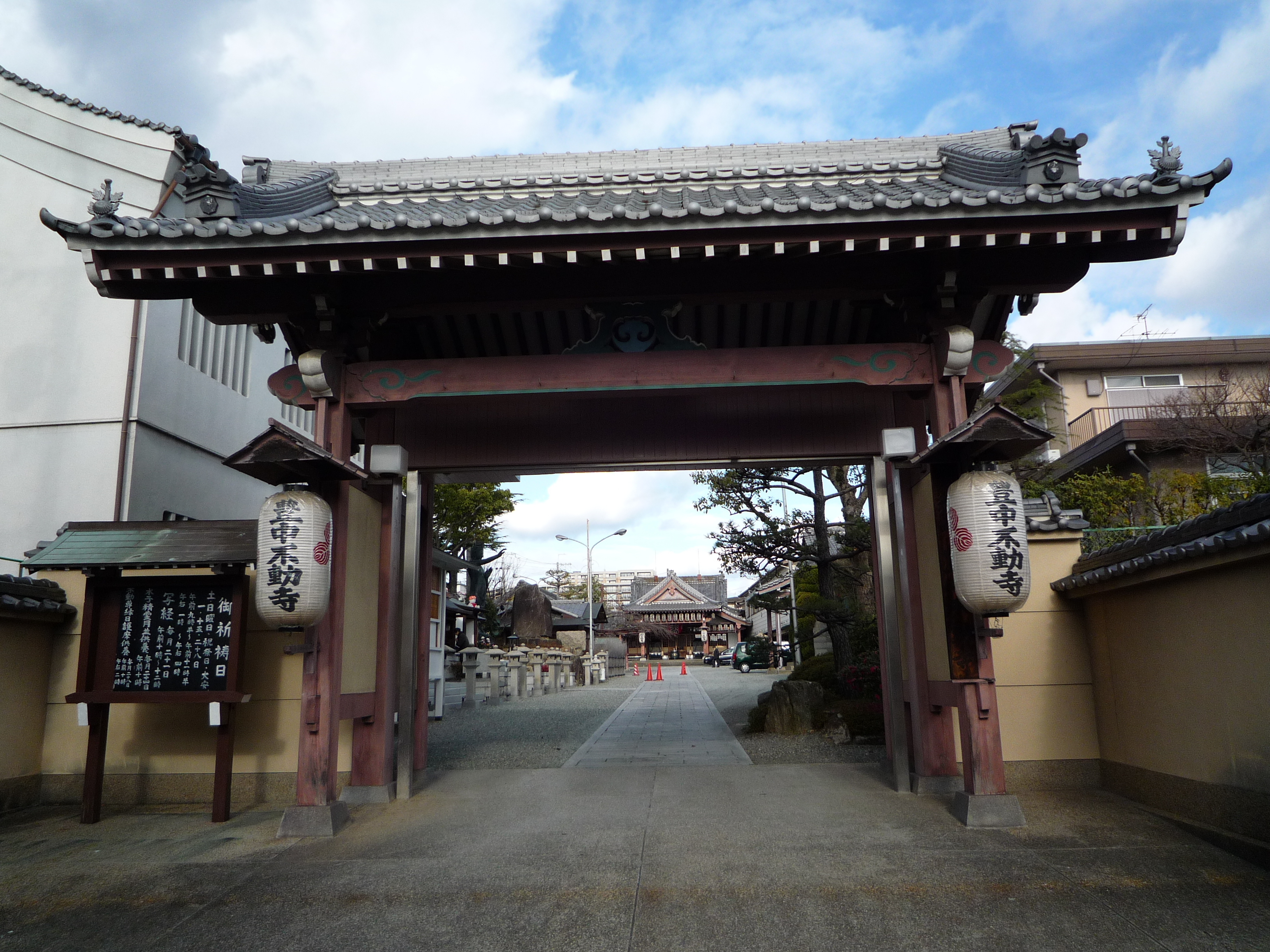 豊中不動尊山門